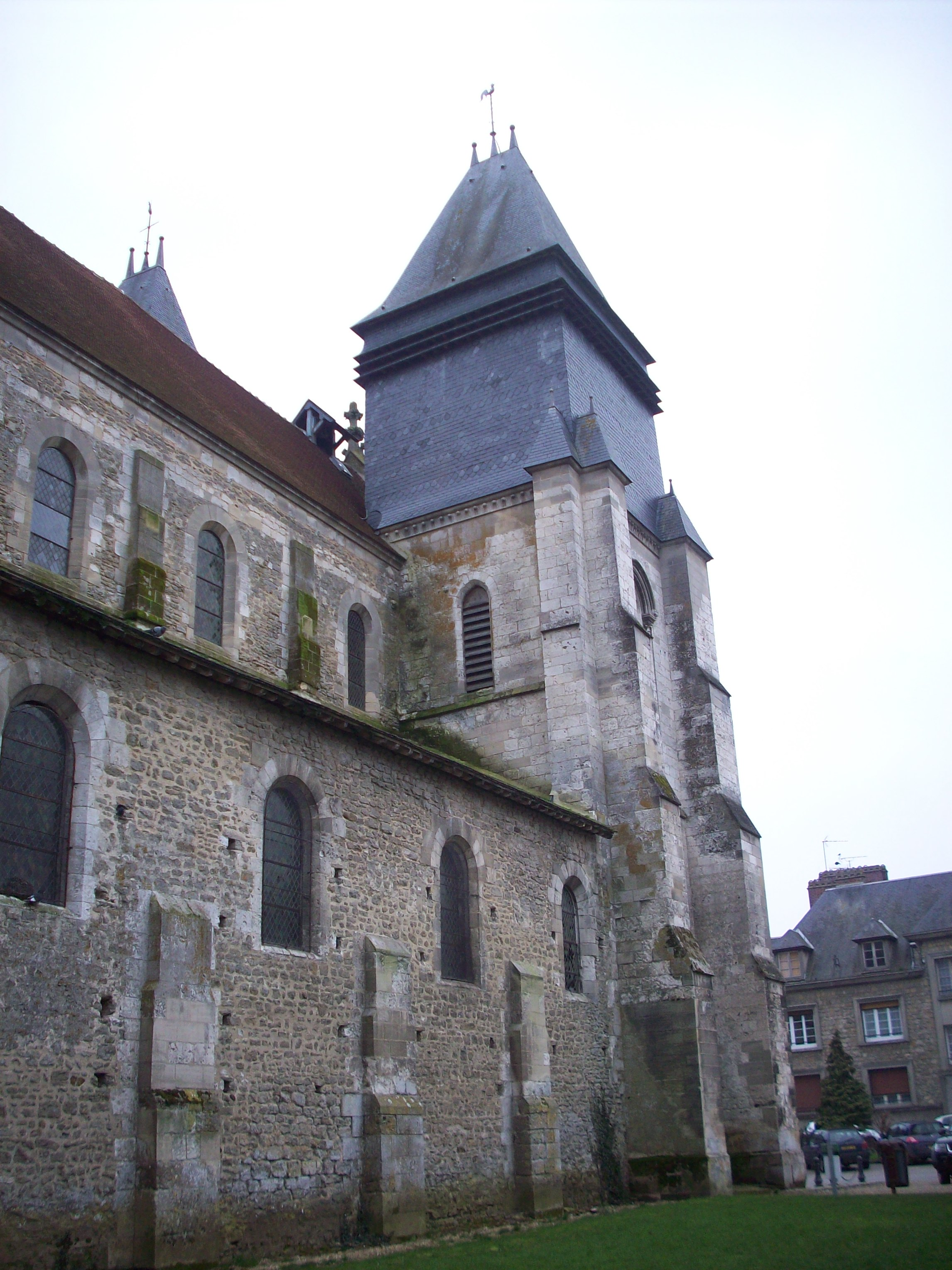 Clocher et nef nord.